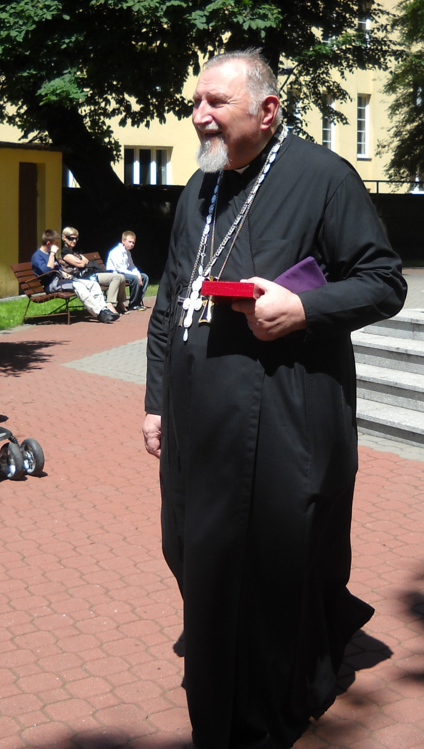 Ks. Jan Sezonow